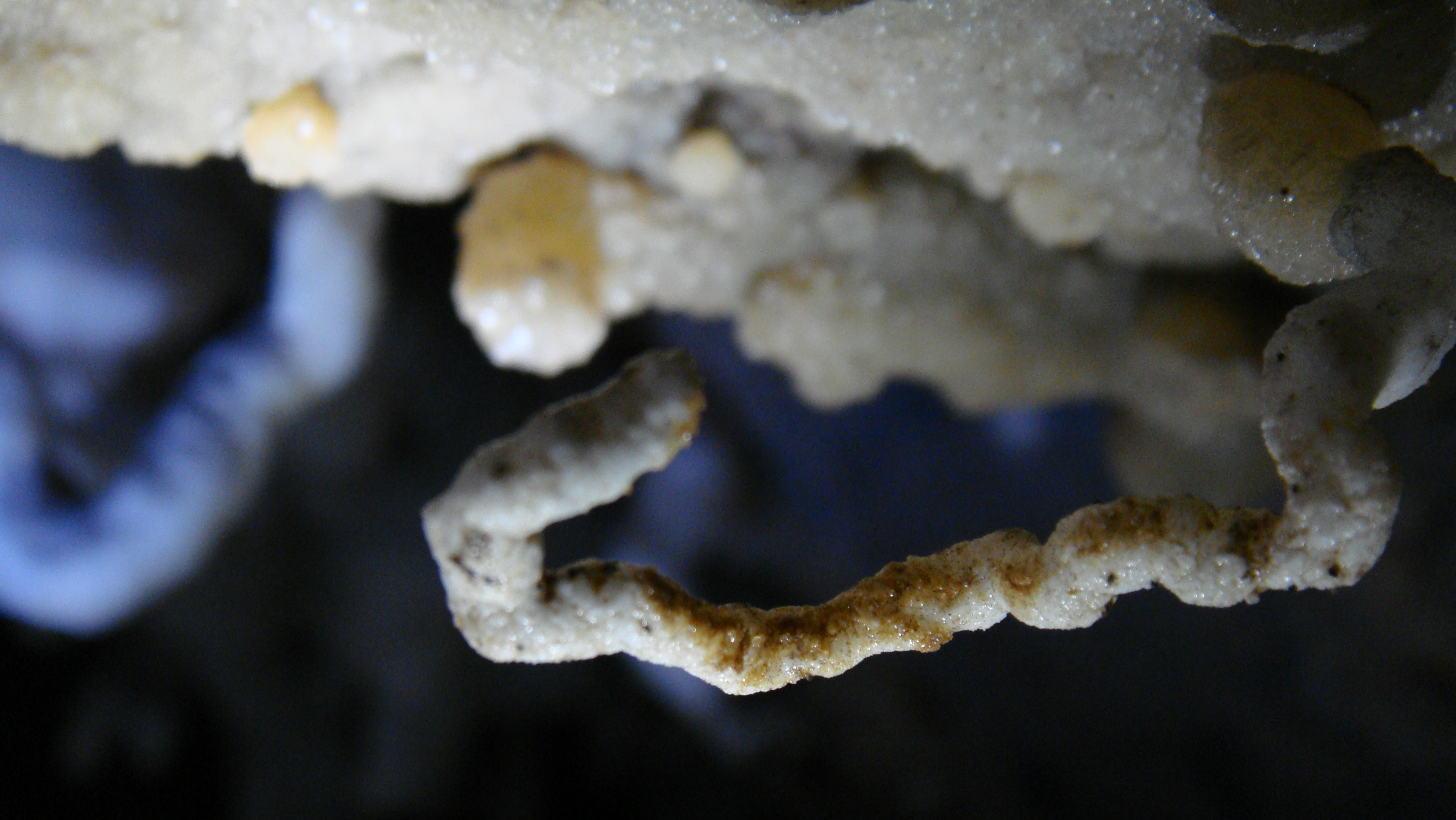 Cueva en las cercanías de Llanes, Asturias (España). Espeleotema. Helictita